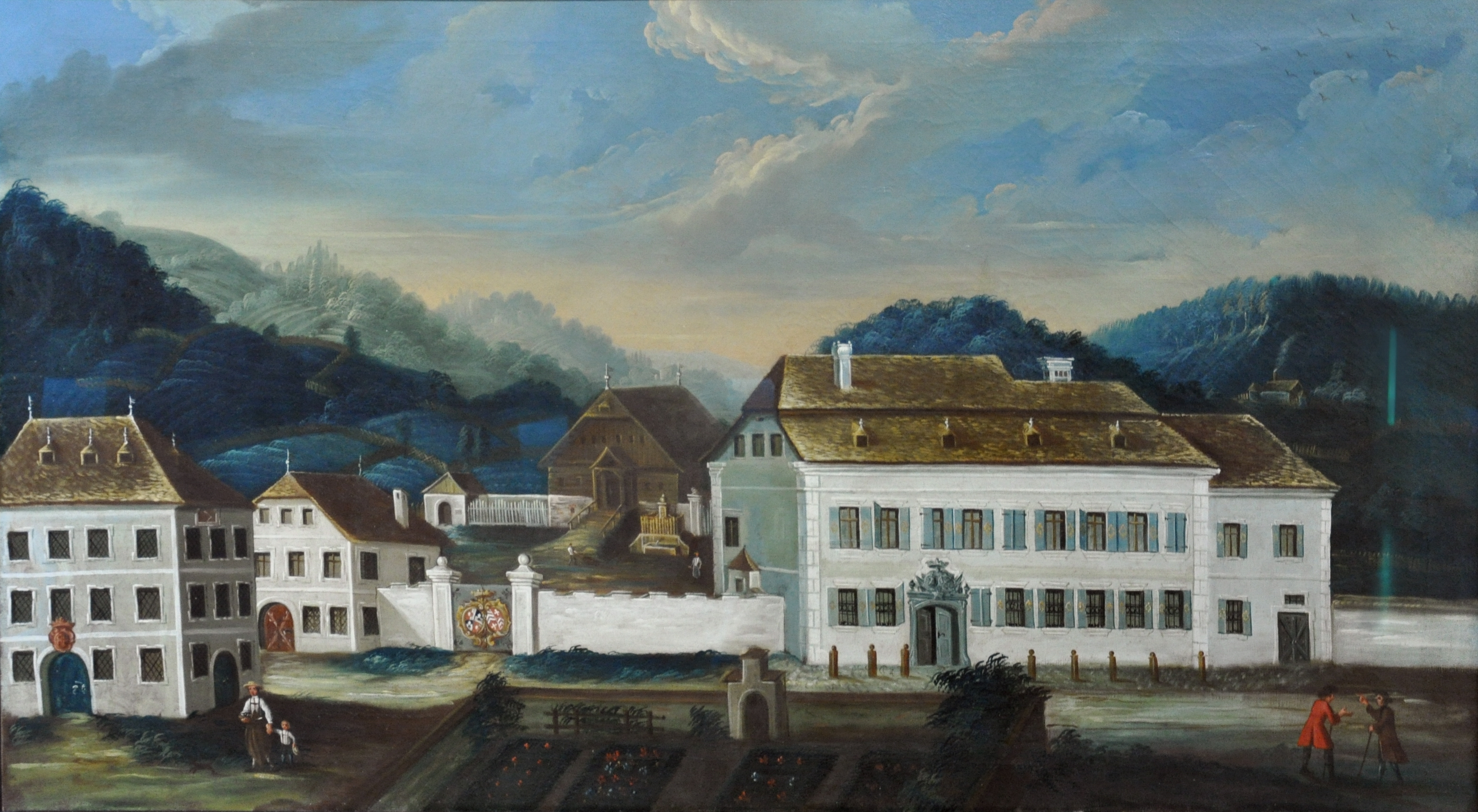 Gräfliches Schloss Kuenburg in Tamsweglabel QS:Lde,"Gräfliches Schloss Kuenburg in Tamsweg"